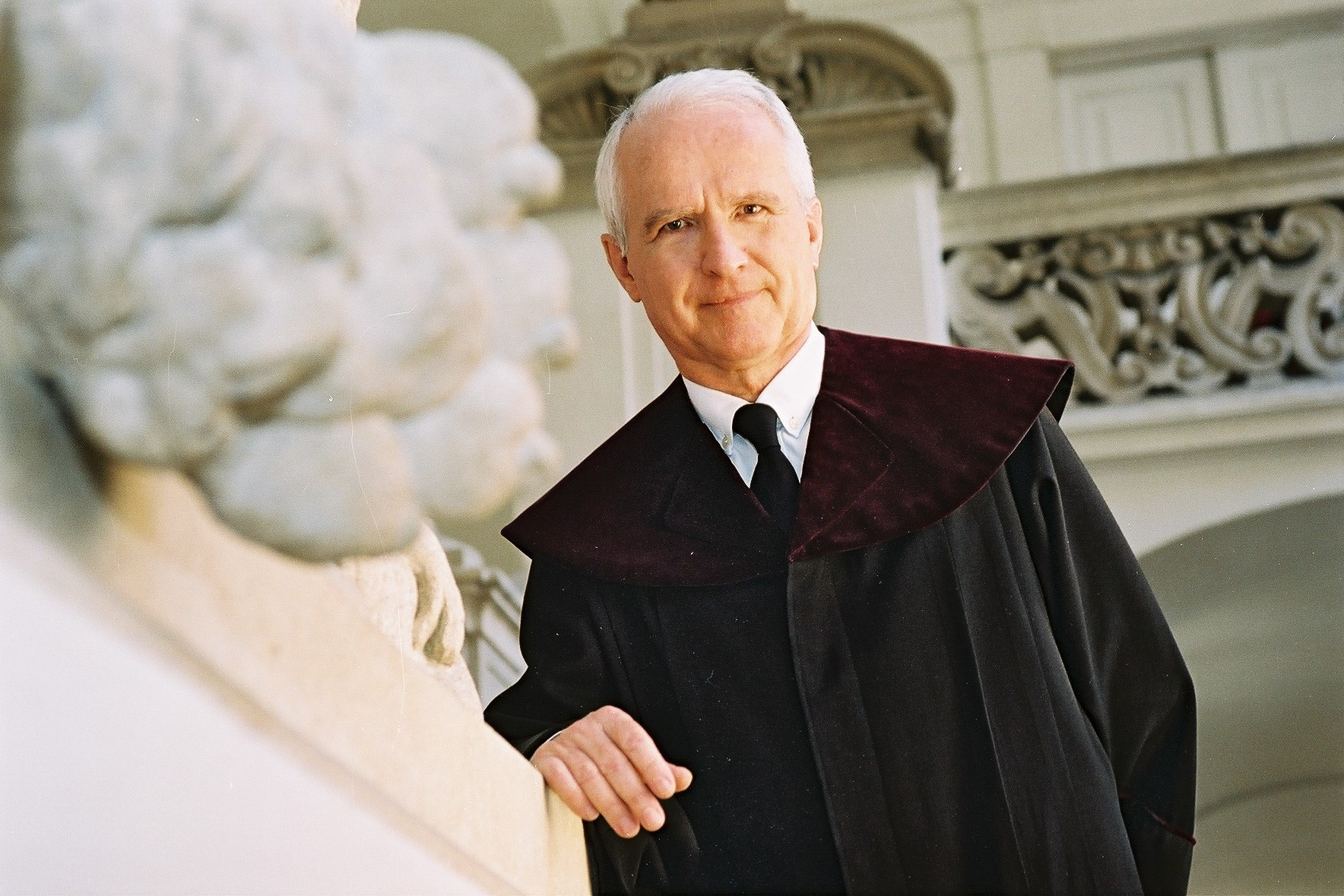 Dr. Siegbert Morscher ist ein österreichischer Jurist, Universitätsprofessor und ehemaliger Verfassungsrichter. Hier auf einem Bild des VfGH aus dem Jahr 2003.